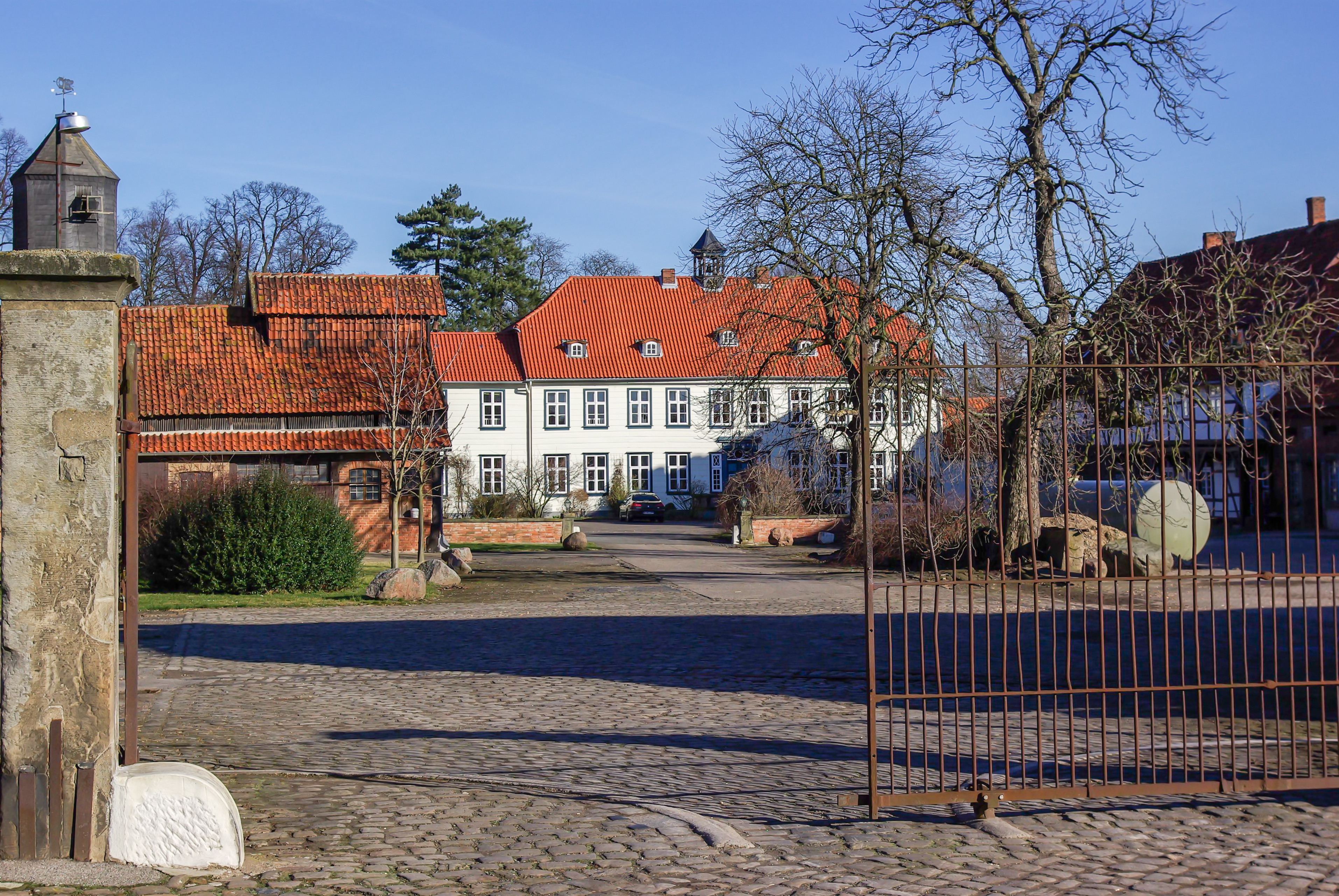 Pattensen Ortsteil Reden. Das Gutshaus an der Straße nach Koldingen.